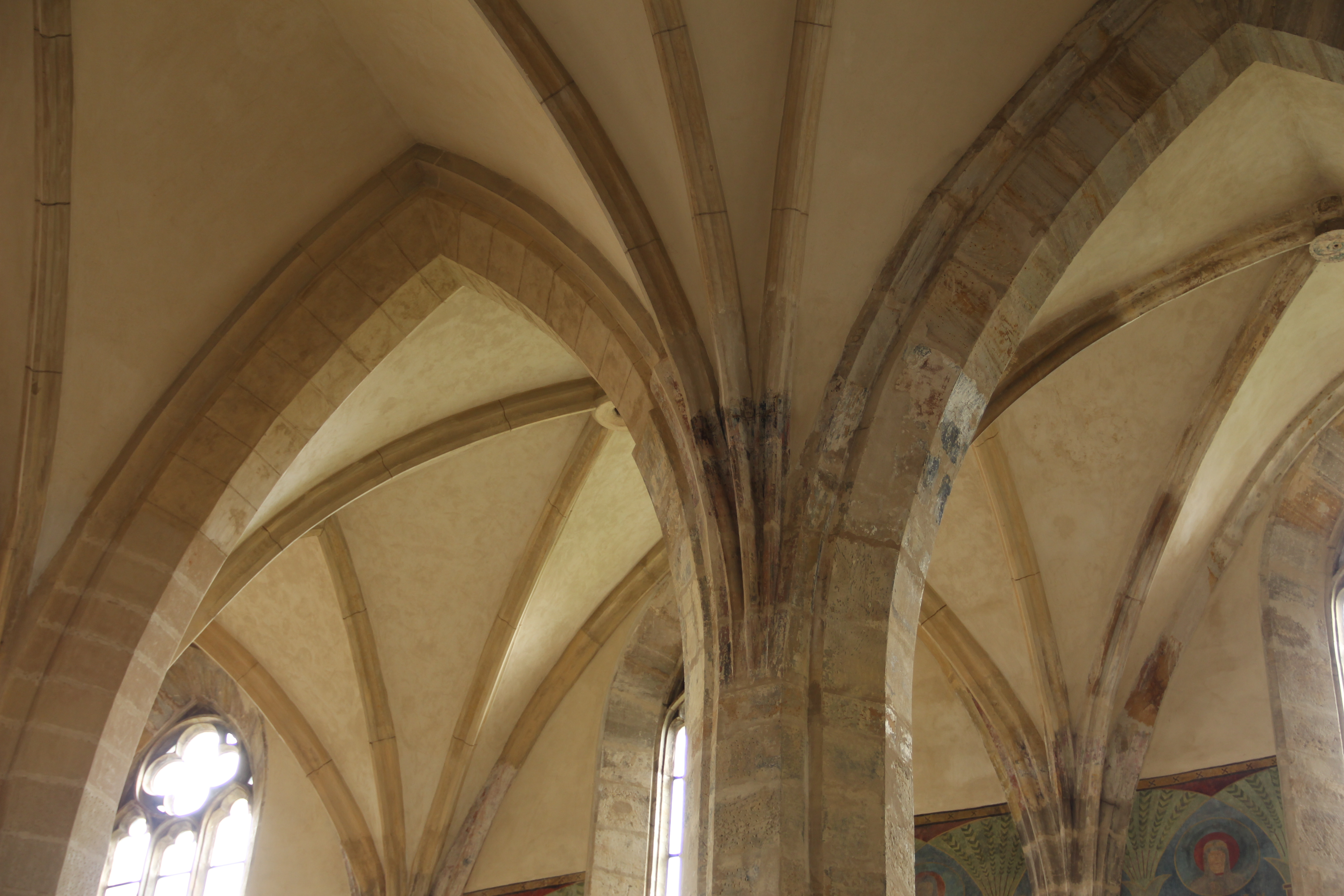 Piliere